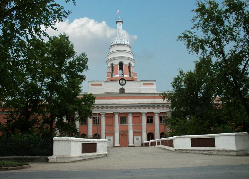 Главный корпус Оружейного завода